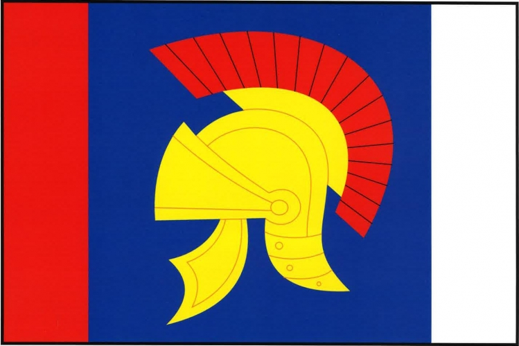 Vlajka, Lavičné, okres Svitavy